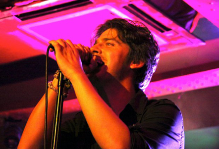 musico cantante guillermo martin jaen